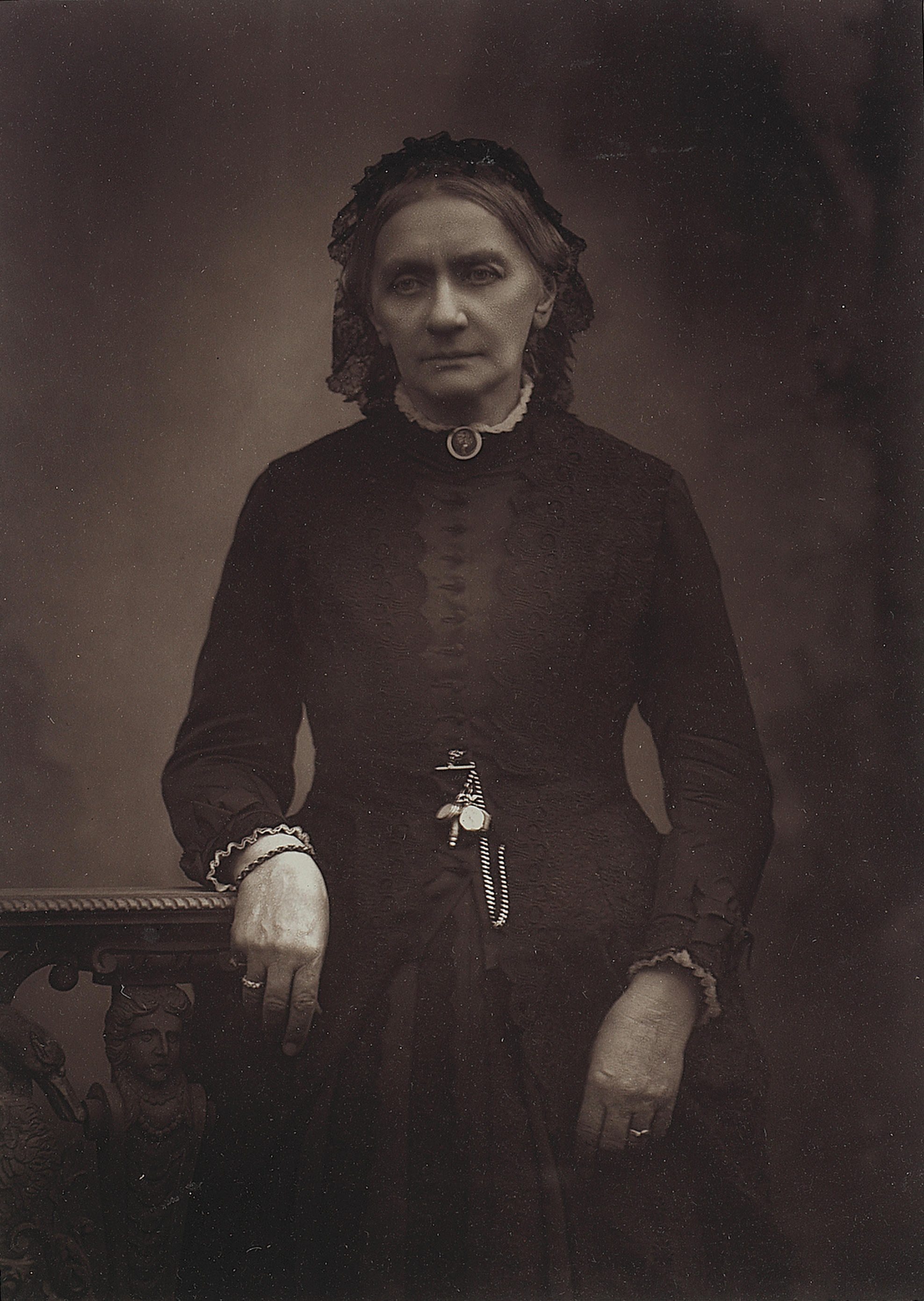 Clara Schumann. Photograph 29,2 x 21,6 cm